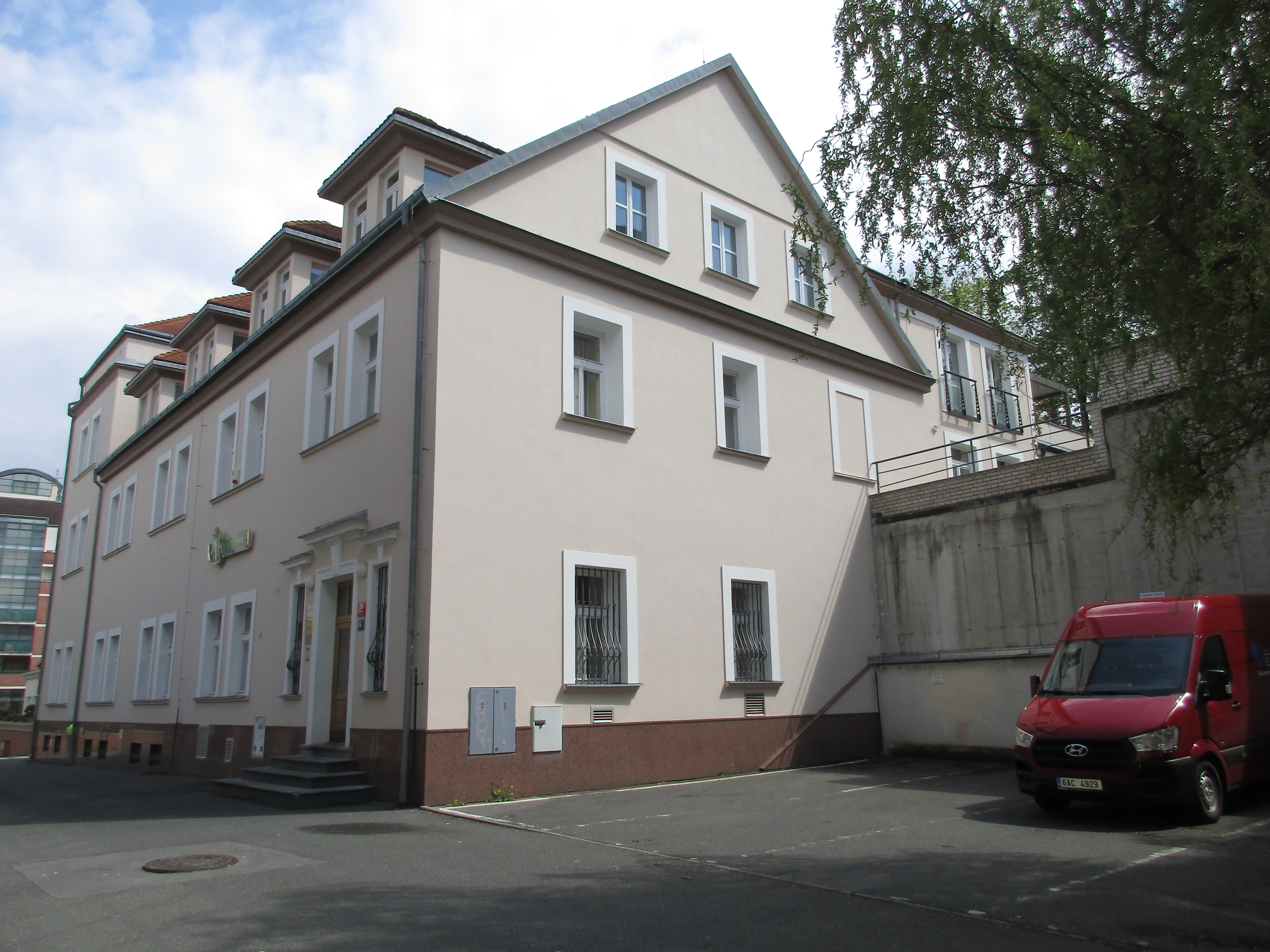 Kapslovna Žižkov - usedlost Parukářka po přestavbě.